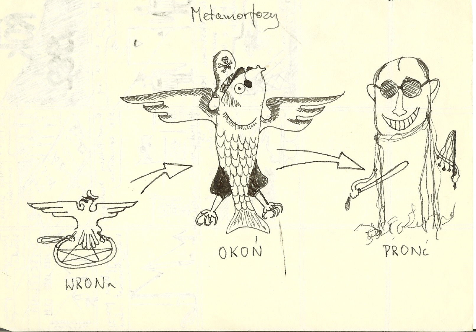 Metamorfozy - rys. z czasów stanu wojennego, aut. Maciej Miezian